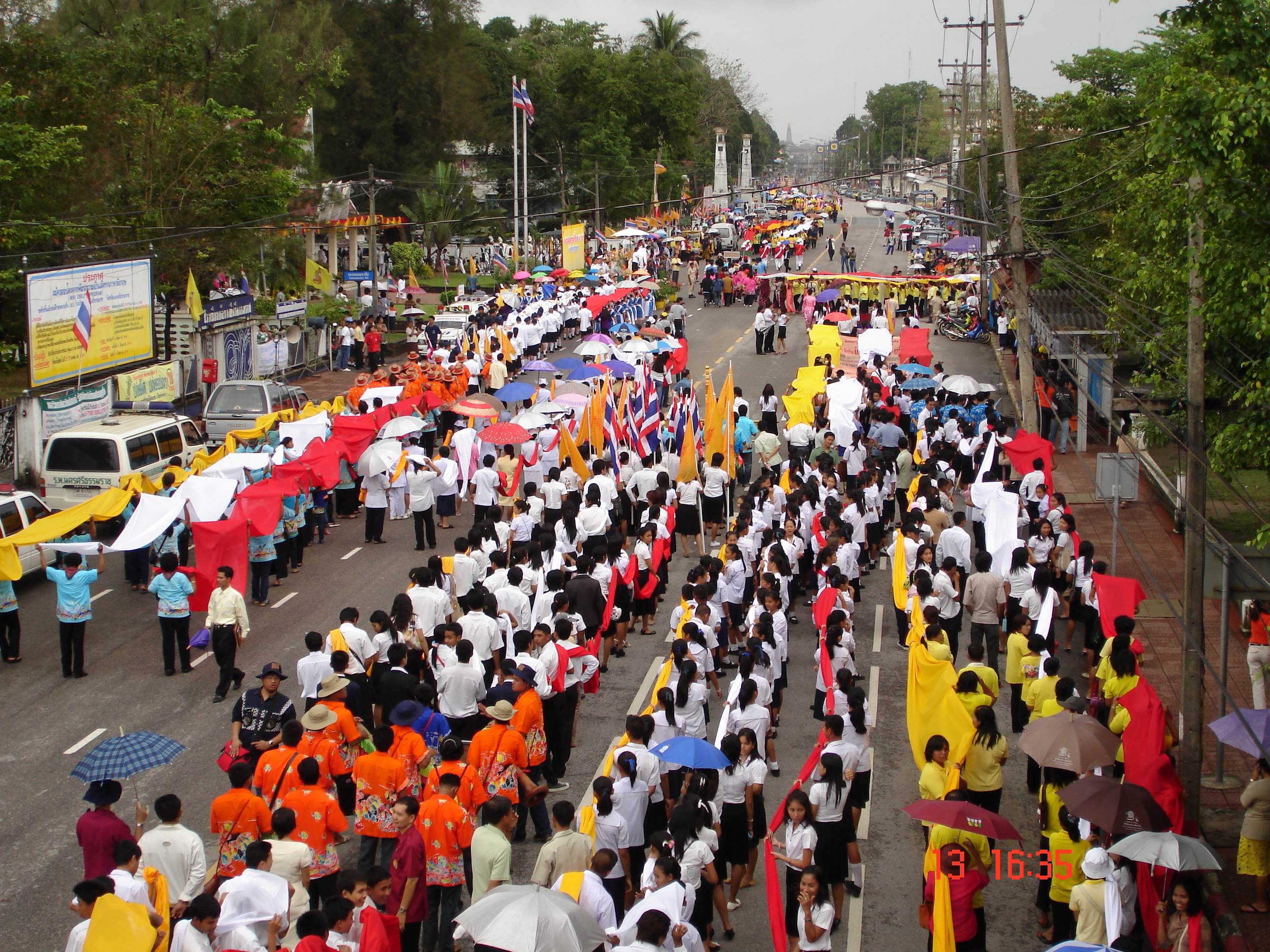 ภาพประเพณีการห่วมแห่ผ้าขึ้นธาตุ